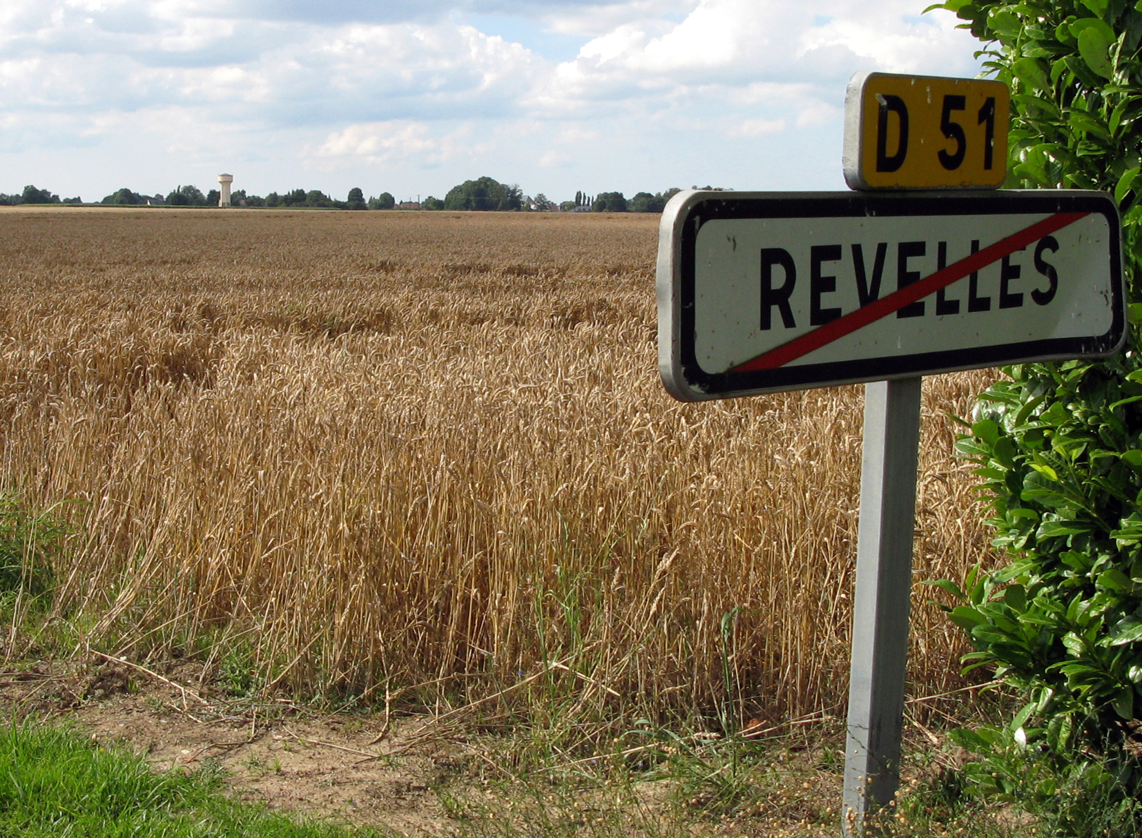 Revelles (Somme, France) - Panneau à la sortie du village, en allant vers Quevauvillers. A l'horizon, on aperçoit le village de Fluy, avec son château d'eau.